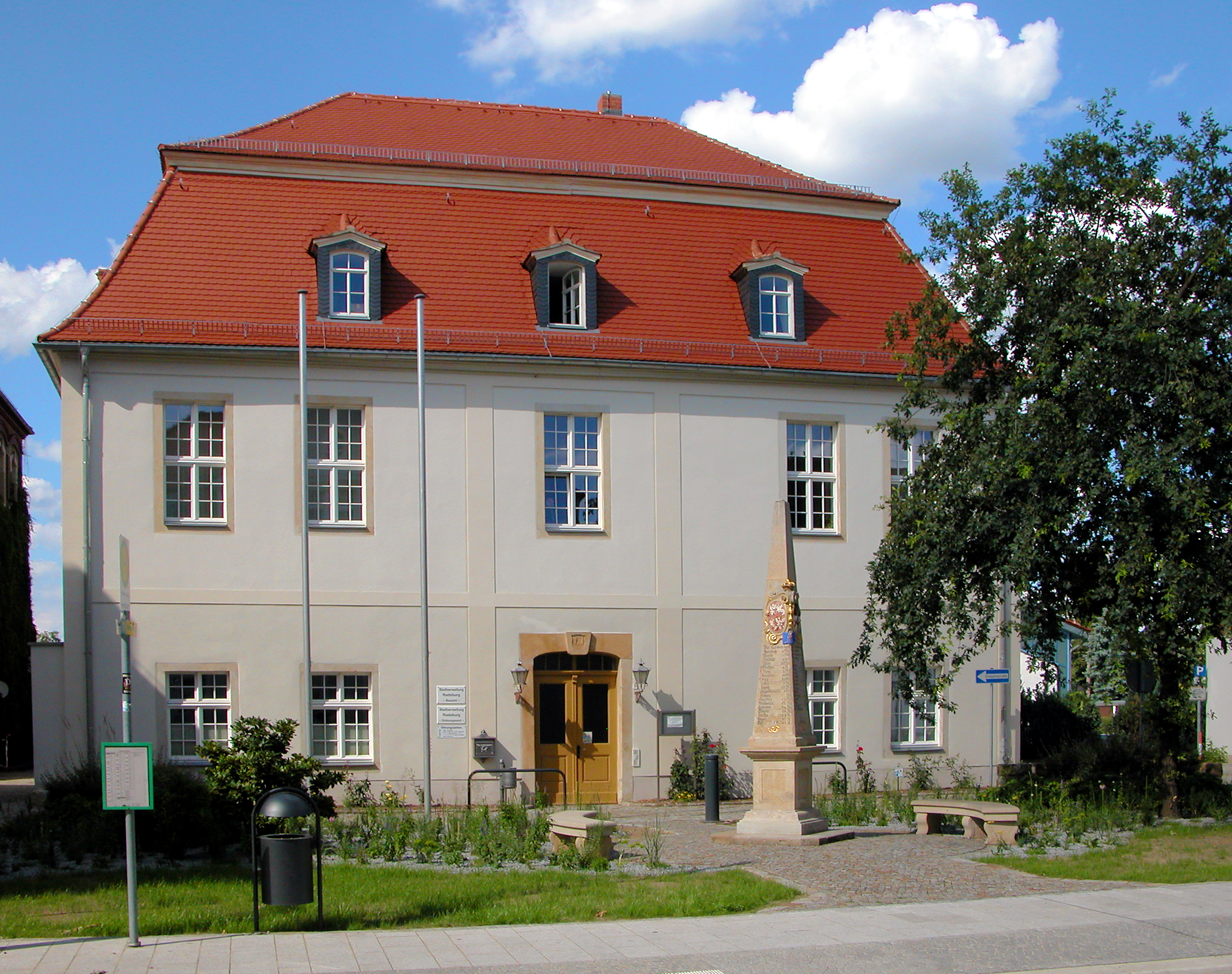 09.07.2012 01471 Radeburg, Heinrich-Zille-Straße 11: Herrenhaus (GMP: 51.215135,13.725808) des ehemaligen (weiter nördlich am Hofwall liegenden) Ritterguts. Das barocke Herrenhaus stammt aus der zweiten Hälfte des 18. Jahrhunderts war bis 1927 im Besitz der Fürstenfamilie Reuß ältere Linie. Ab 1853 war hier das Amtsgericht und zwischen 1910 bis etwa 1995 waren Wohnungen eingerichtet. Heute dient der Herrensitz der Stadtverwaltung. Davor die Postmeilensäule von 1728. Sicht von Südwesten (Straßenseite). [DSCNn4333.TIF]20120709330DR.JPG(c)Blobelt